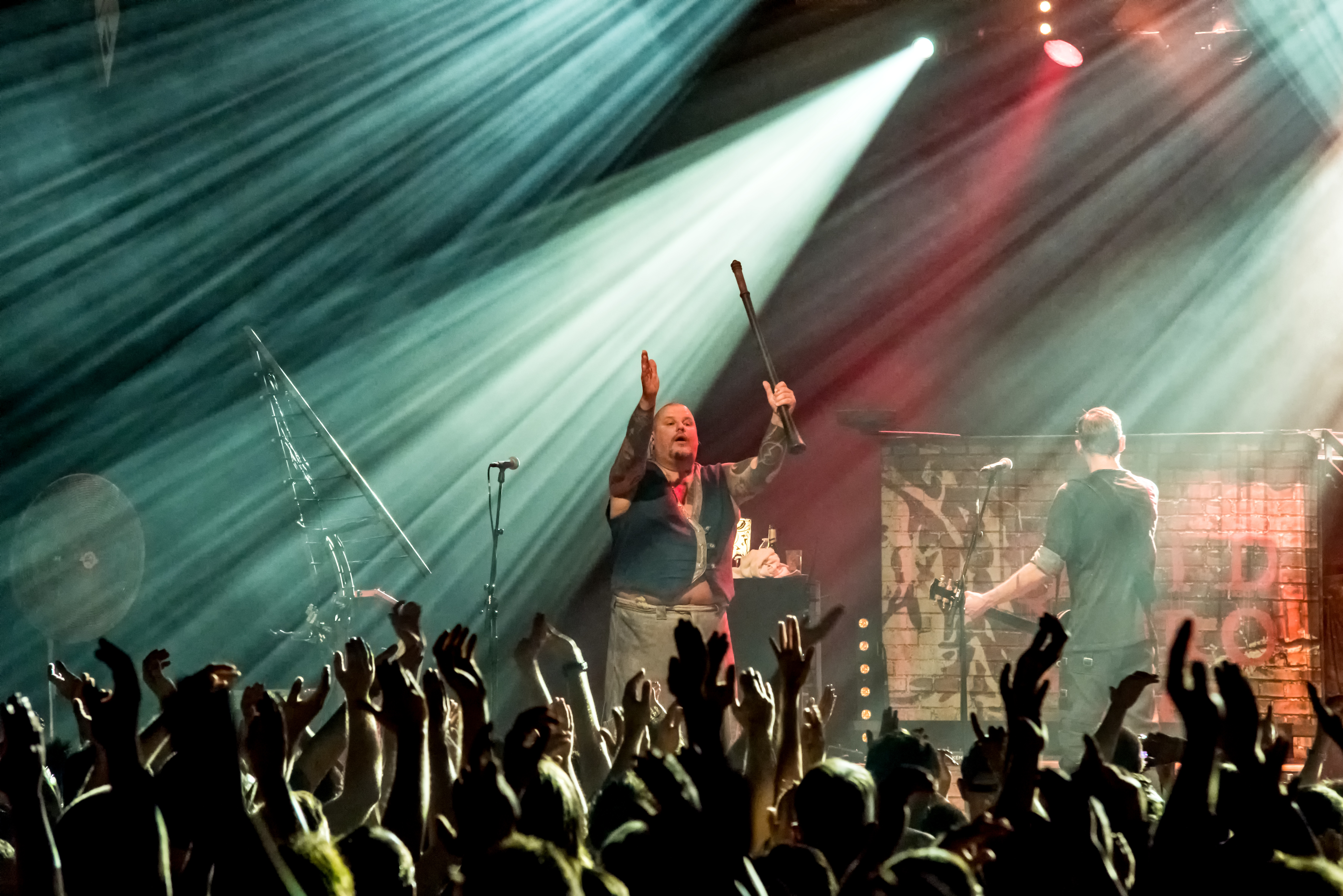 Bilder vom Zelt Musik Festival 2018 in Freiburg im Breisgau In Extremo am 29.07.2018 im Zirkuszelt